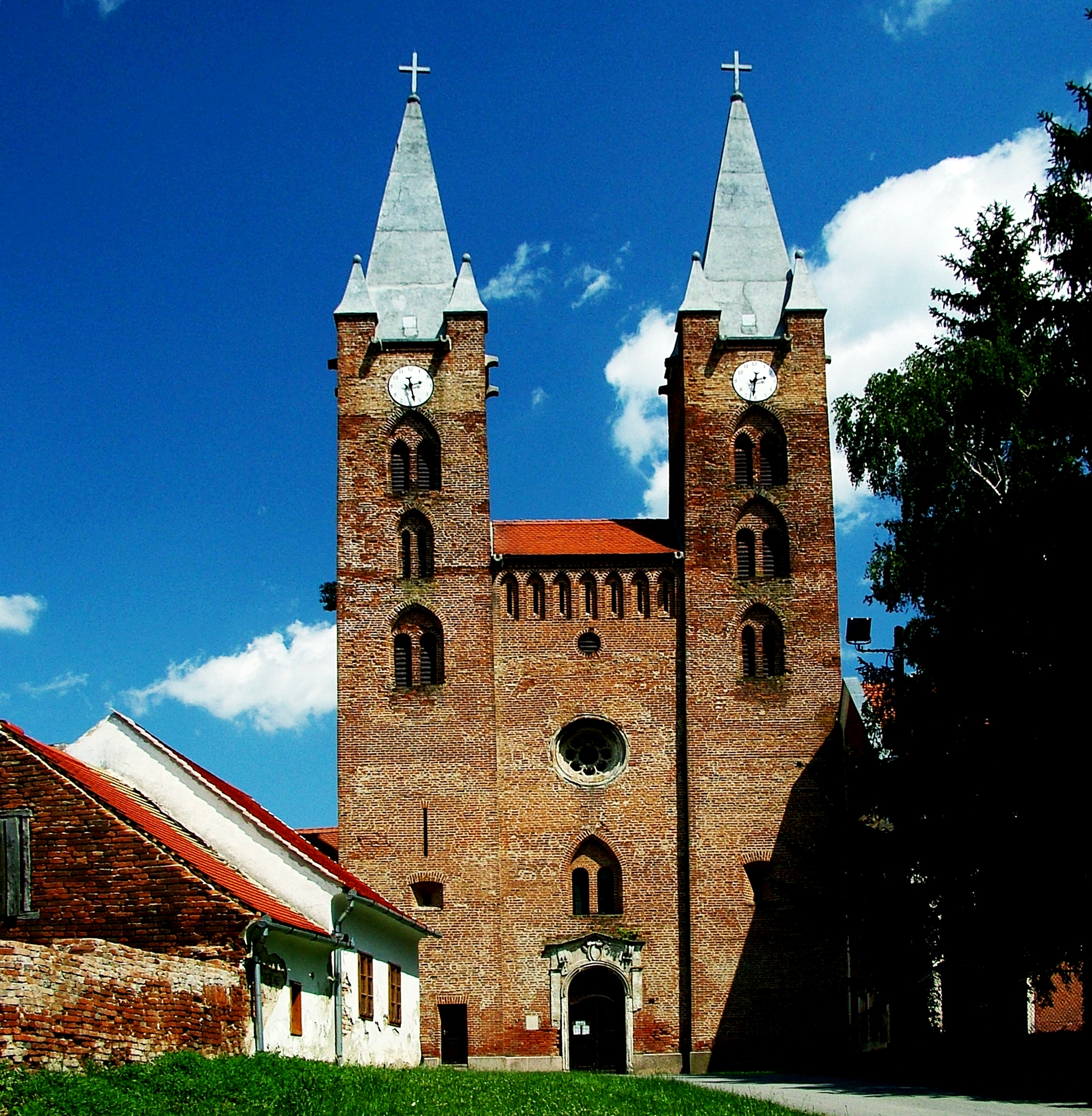 Türjei prépostsági- és plébániatemplom nyugati homlokzata (Zala megye)